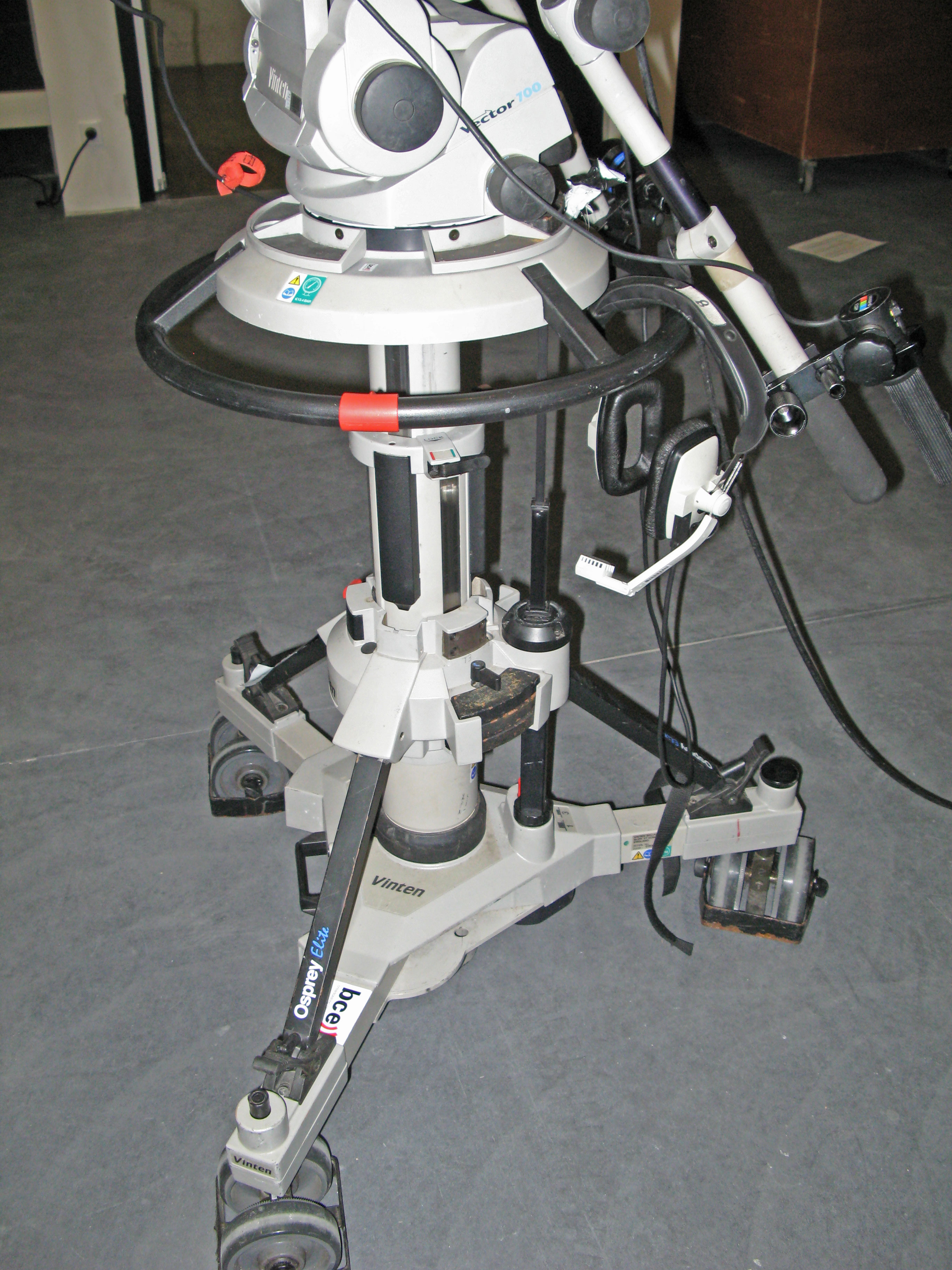 Pedestal.